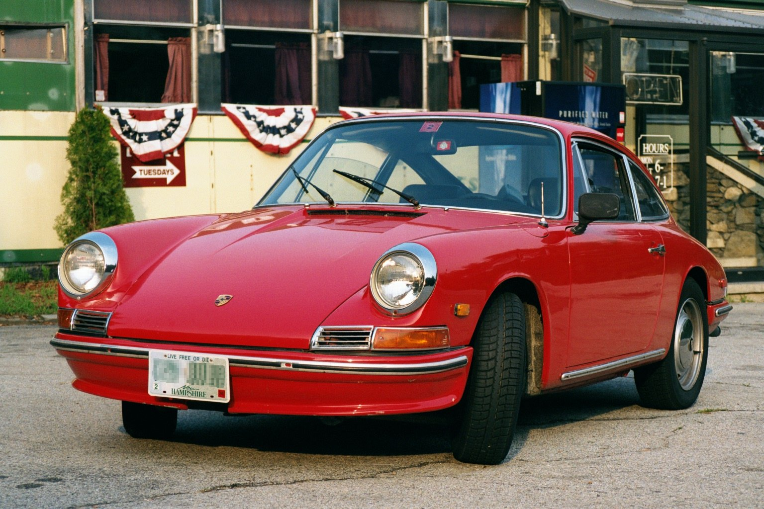 roter Porsche 912, Baujahr 1968